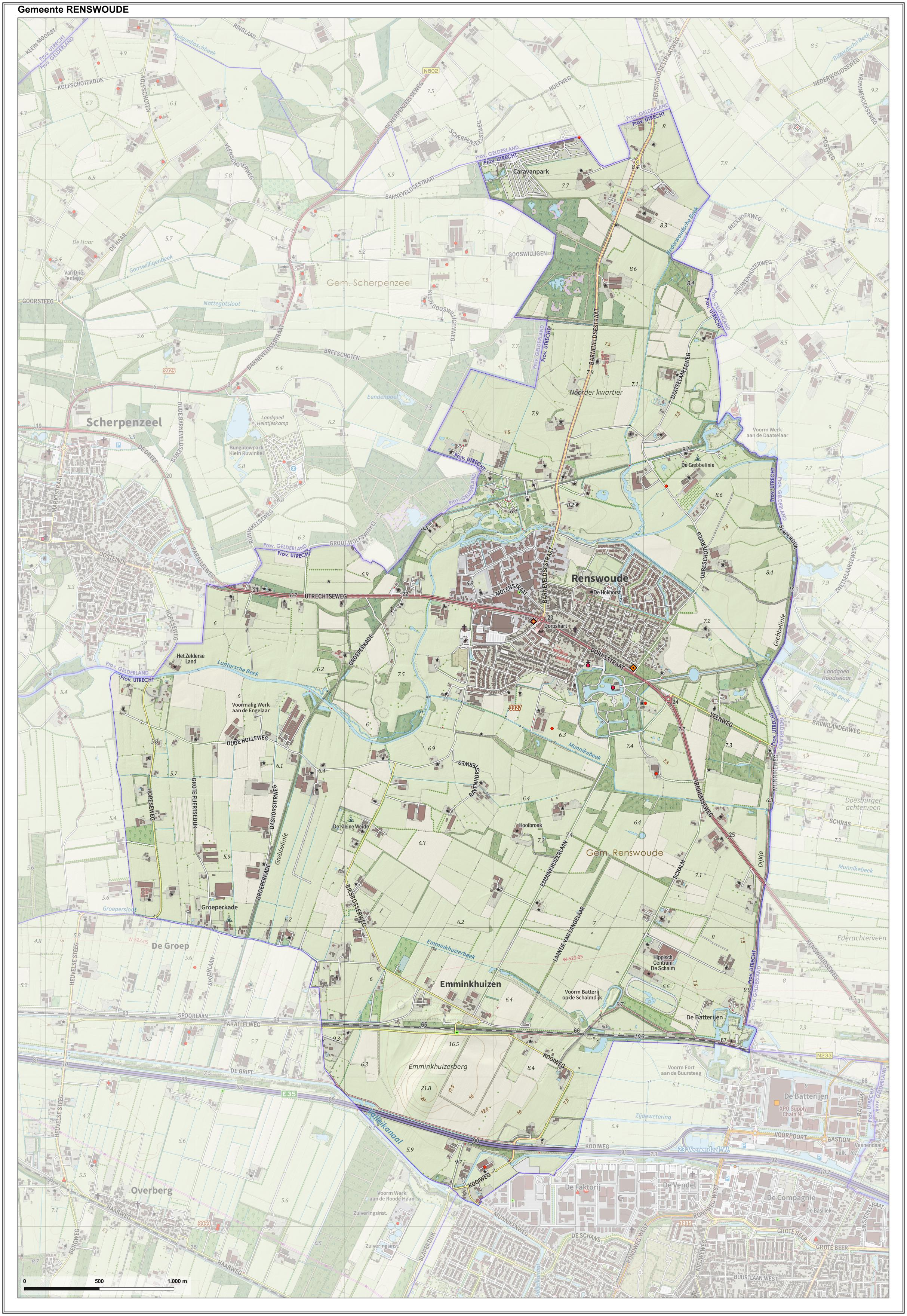 Topografische gemeentekaart. Resolutie: 400 pixels/km. Kaartbeeld samengesteld uit de open geodata van de Top10NL en Top25namen (Kadaster), Creative Commons-BY licentie. Gebouwvlakken uit open geodata BAG extract. Wegen uit de OpenStreetMap, OpenStreetMap community. Reliëfschaduw uit de Actuele Hoogtekaart AHN2. Samenstelling en kleurenschema: Jan-Willem van Aalst, met QGIS. Zie ook de Legenda.